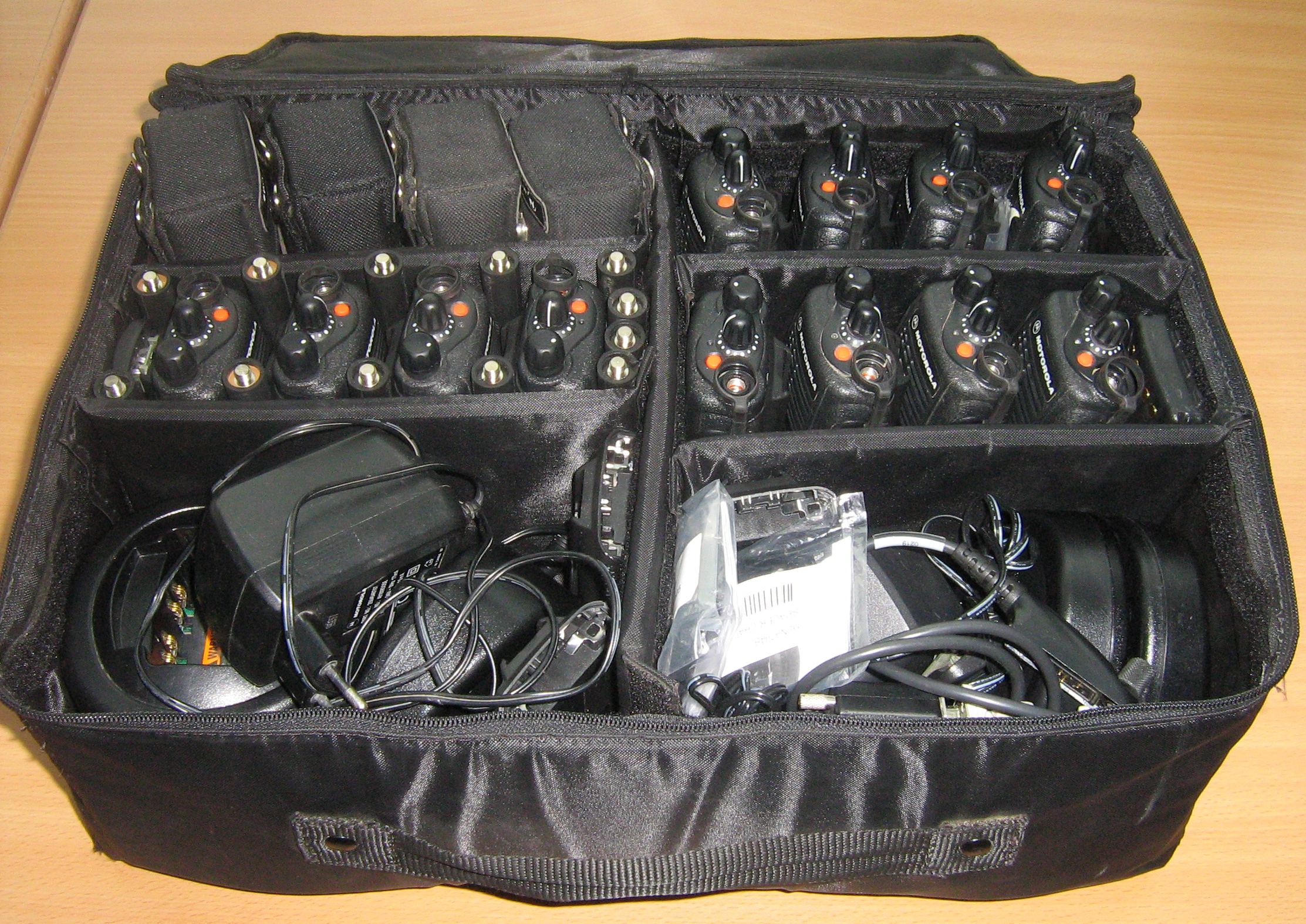 Sac de kit d'émetteurs-récepteurs radiotéléphonique VHF de secours, d'urgence de catastrophe. Pour quatre volontaires internationaux et quatre volontaires locaux. Le sac est composé de: 12 émetteurs-récepteurs radiotéléphonique VHF GP360 Motorola et 12 antennes VHF et 16 accumulateurs. 4 chargeurs et 4 socles. 8 housses de transport. 1 câble de programmation et une clef USB ou un Disque compact (avec le logiciel Motorola de programmation et des codeplug types déjà programmés). Accessoires: écouteurs type oreillettes et éventuellement micros déportés.